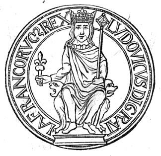 Ludvík VII.